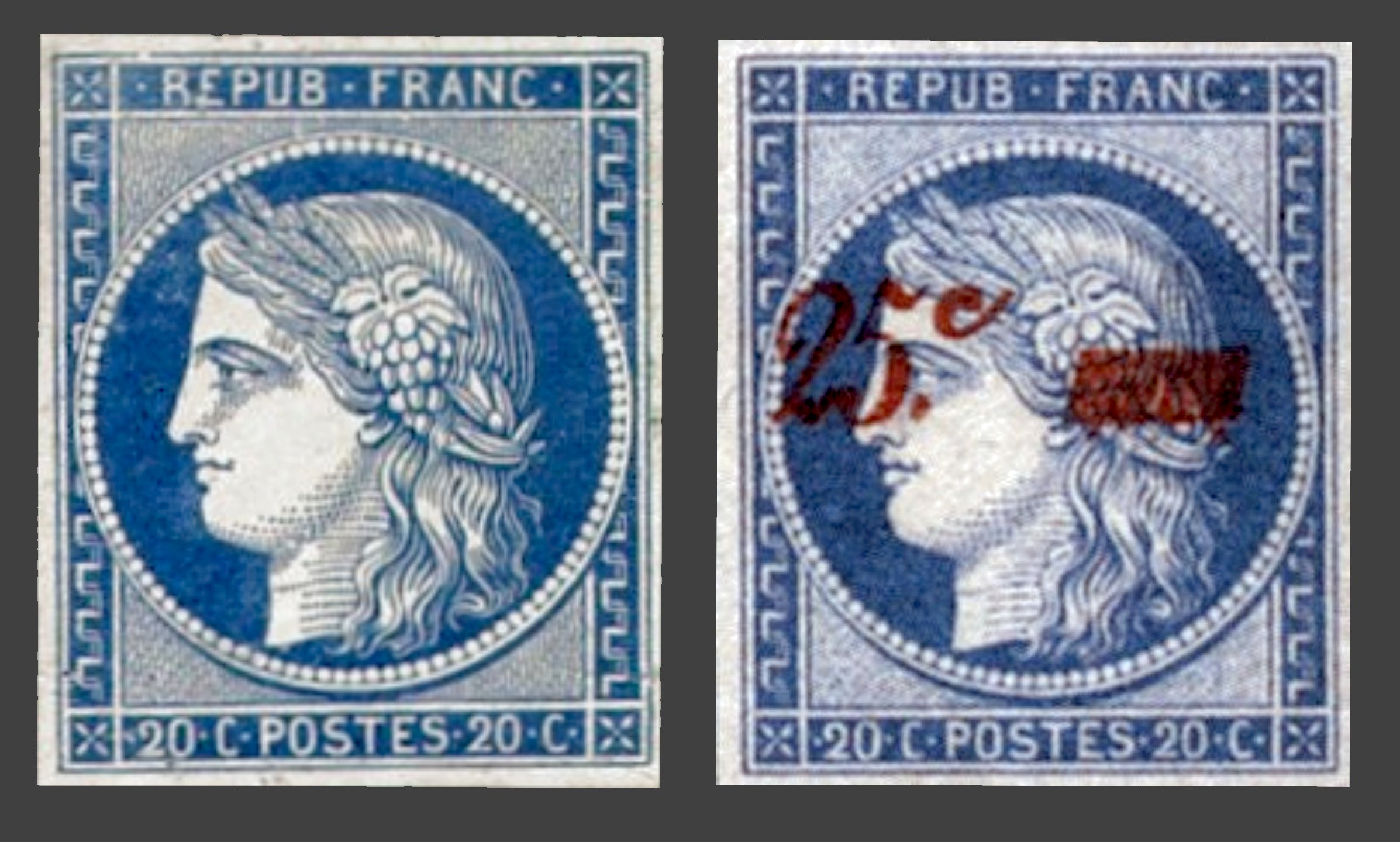 1st stamps of France 1849 (un-issue) / Timbre France 1849 non emis Cérès 2e République 20 centime bleu + tentative de surcharge (réimpression)